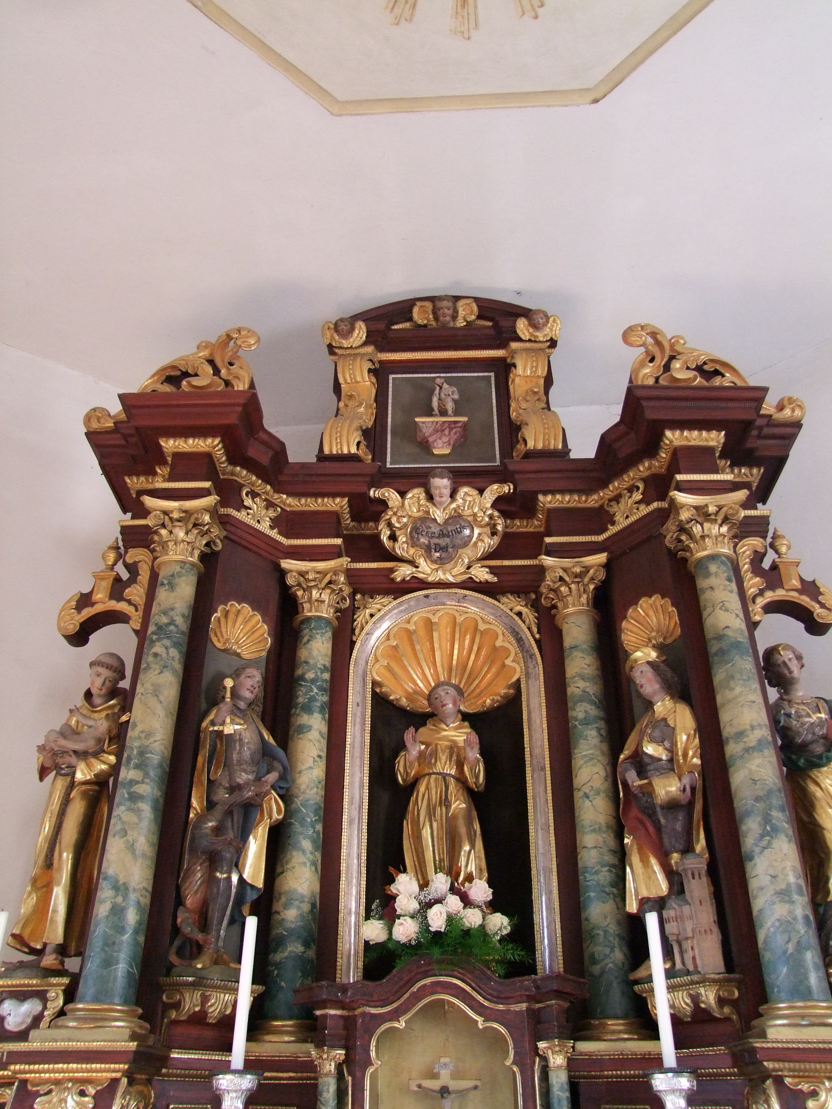 St. Franziskus und Georg im oberschwäbischen Altensteig, einem Ortsteil von Dirlewang in Bayerisch/Schwaben